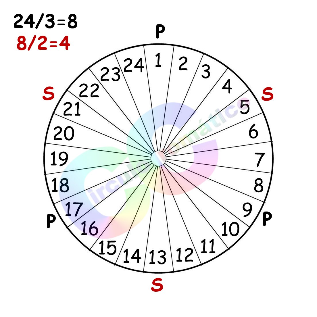 Muestra como marcar los colores primarios y secundarios en un circulo cromatico